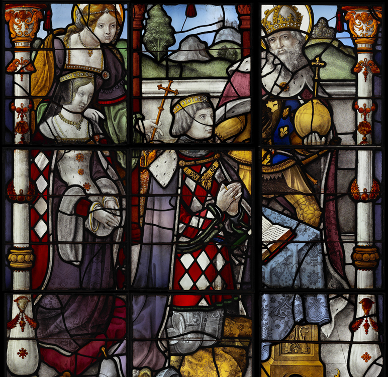 Verrière de Charles de Lalaing et de Marguerite de Croÿ dans l'église Sainte-Catherine de Hoogstraten